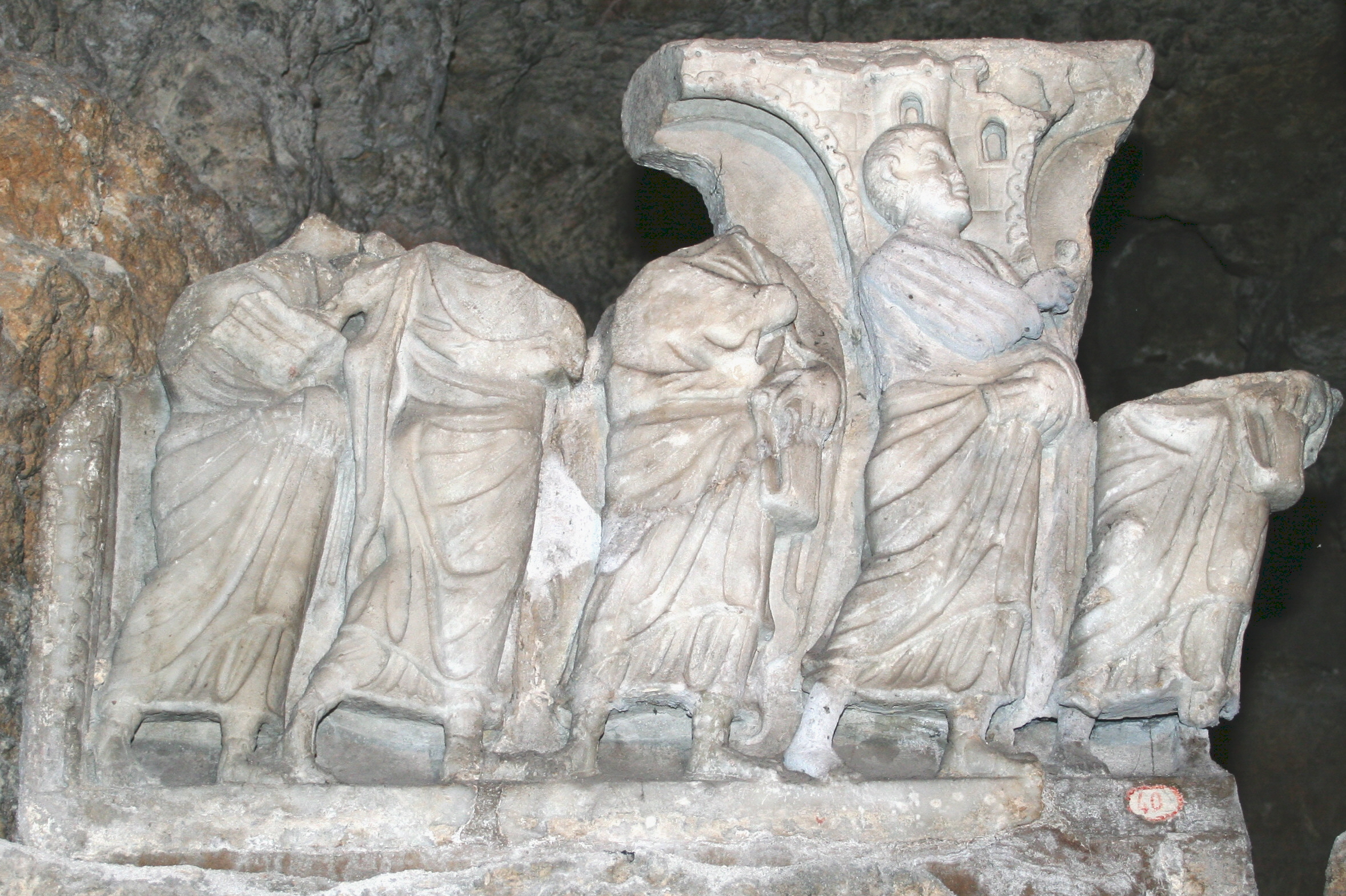 Sarcophage de la fin du IVe siècle dit "de quatre du nombre des sept dormants", fragment de la grande face, en marbre de Carrare, se trouvant dans les cryptes de l'abbaye de saint-Victor à Marseille.